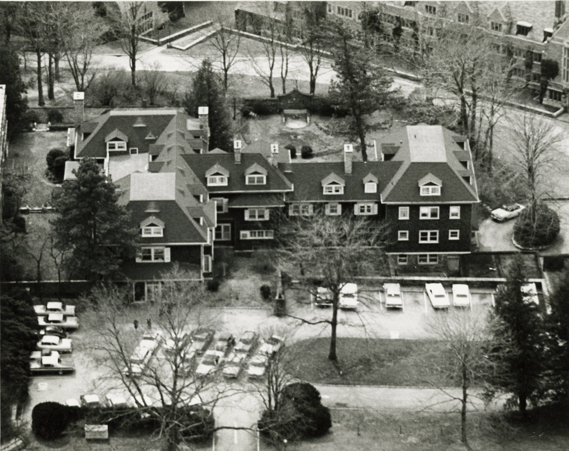 Deanery, Aerial View, Bryn Mawr College